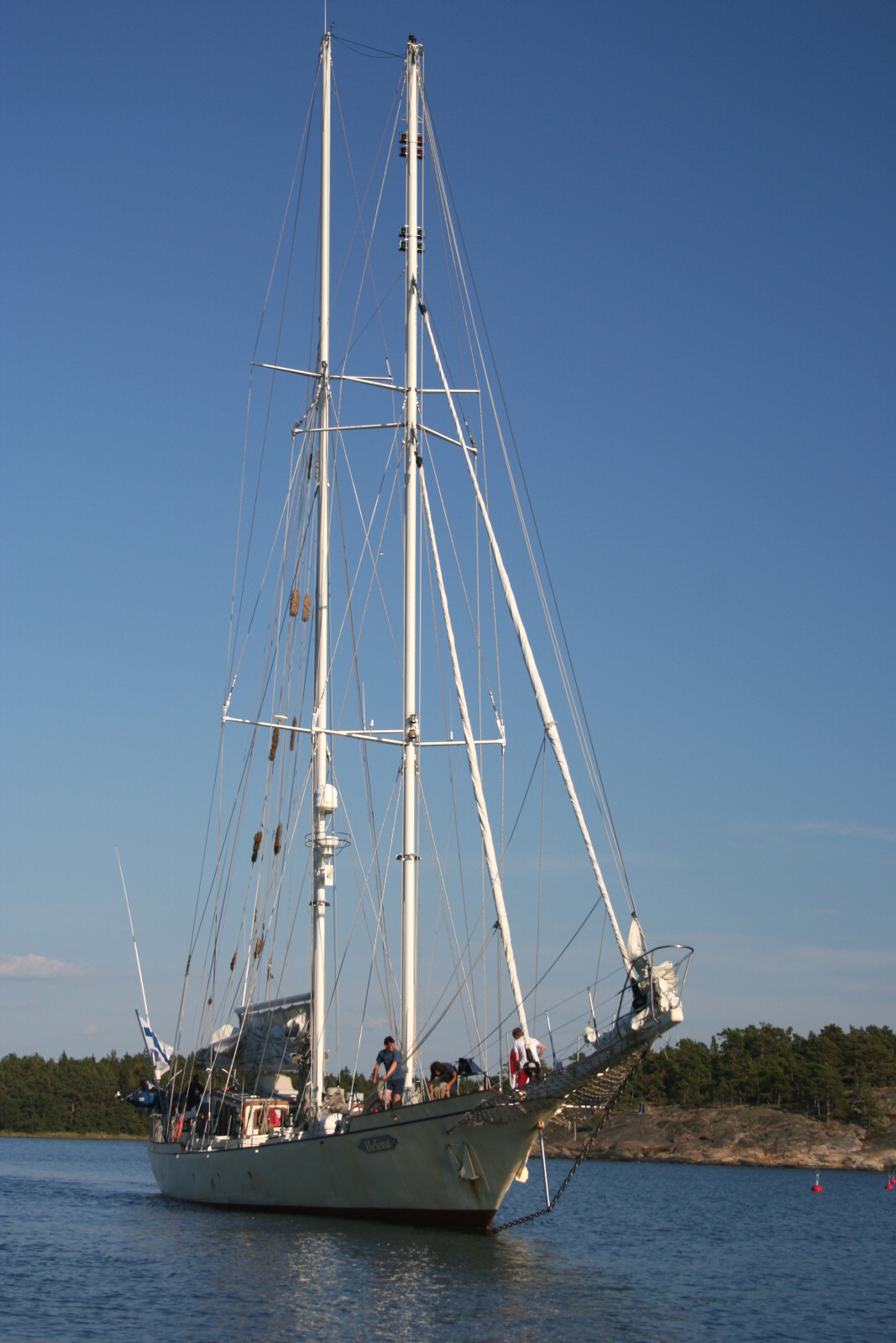 Kuunari Helena, kuvattu Katanpään linnakkeella Kustavissa